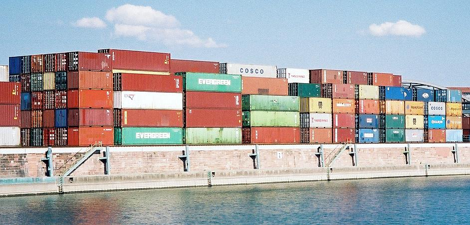 Container im Mannheimer Containerhafen.